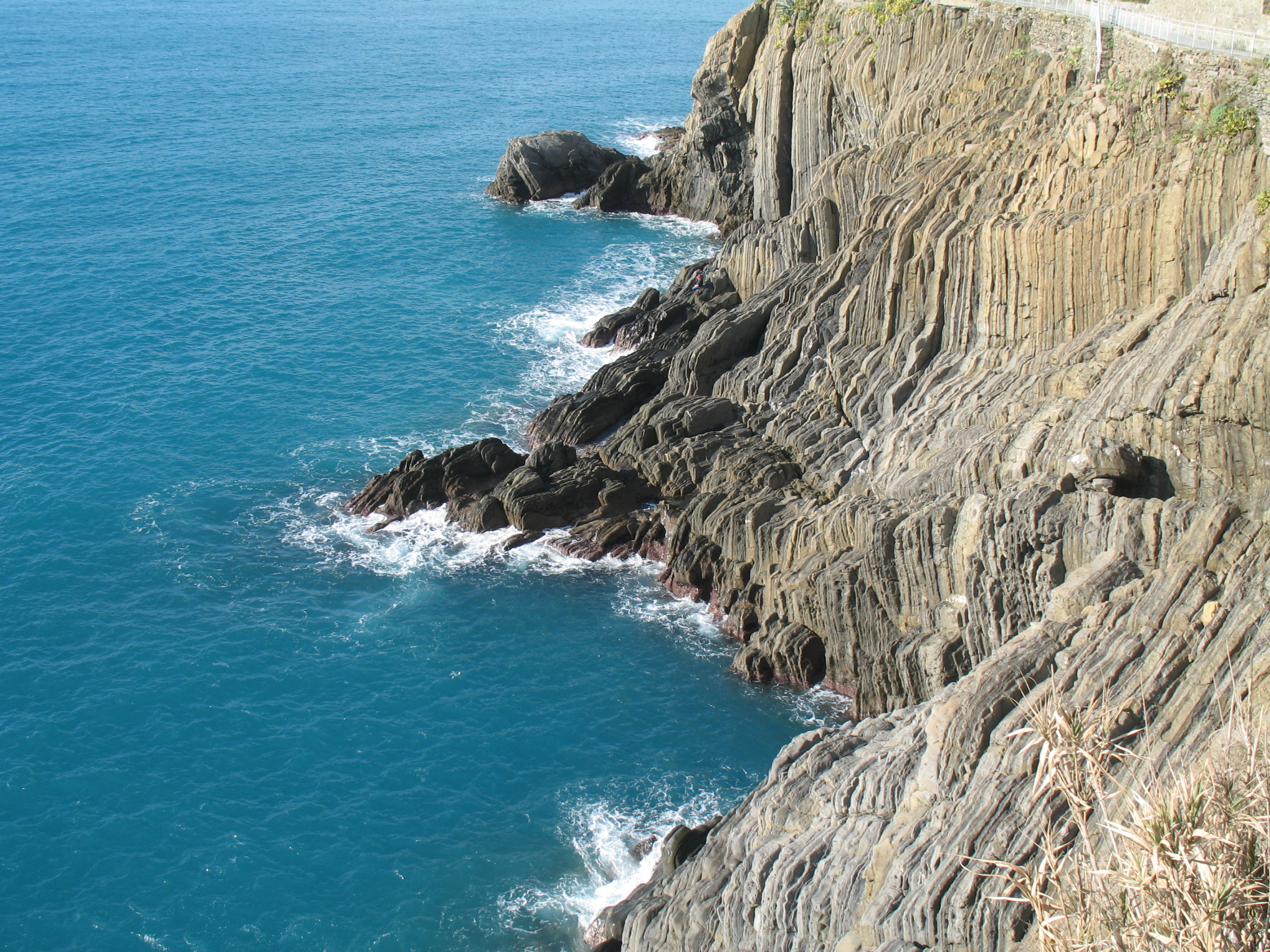 Immagine dalle Cinque Terre Via dell'Amore